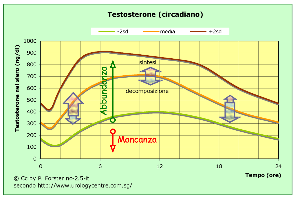 Testosteronemia circadiana: sintesi, decomposizione, abbundanza, mancanza, testosterone, circadiano